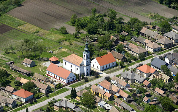 Bolhás, légi fotó